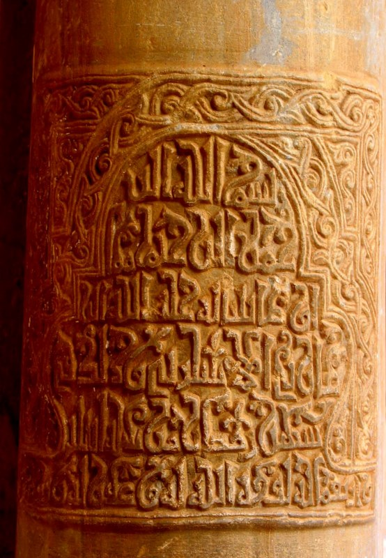 Qairawan: Hauptmoschee. Antike Säule mit Koranzitat aus dem Jahr 1011